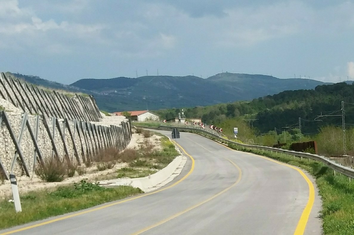 Montaguto former landslide